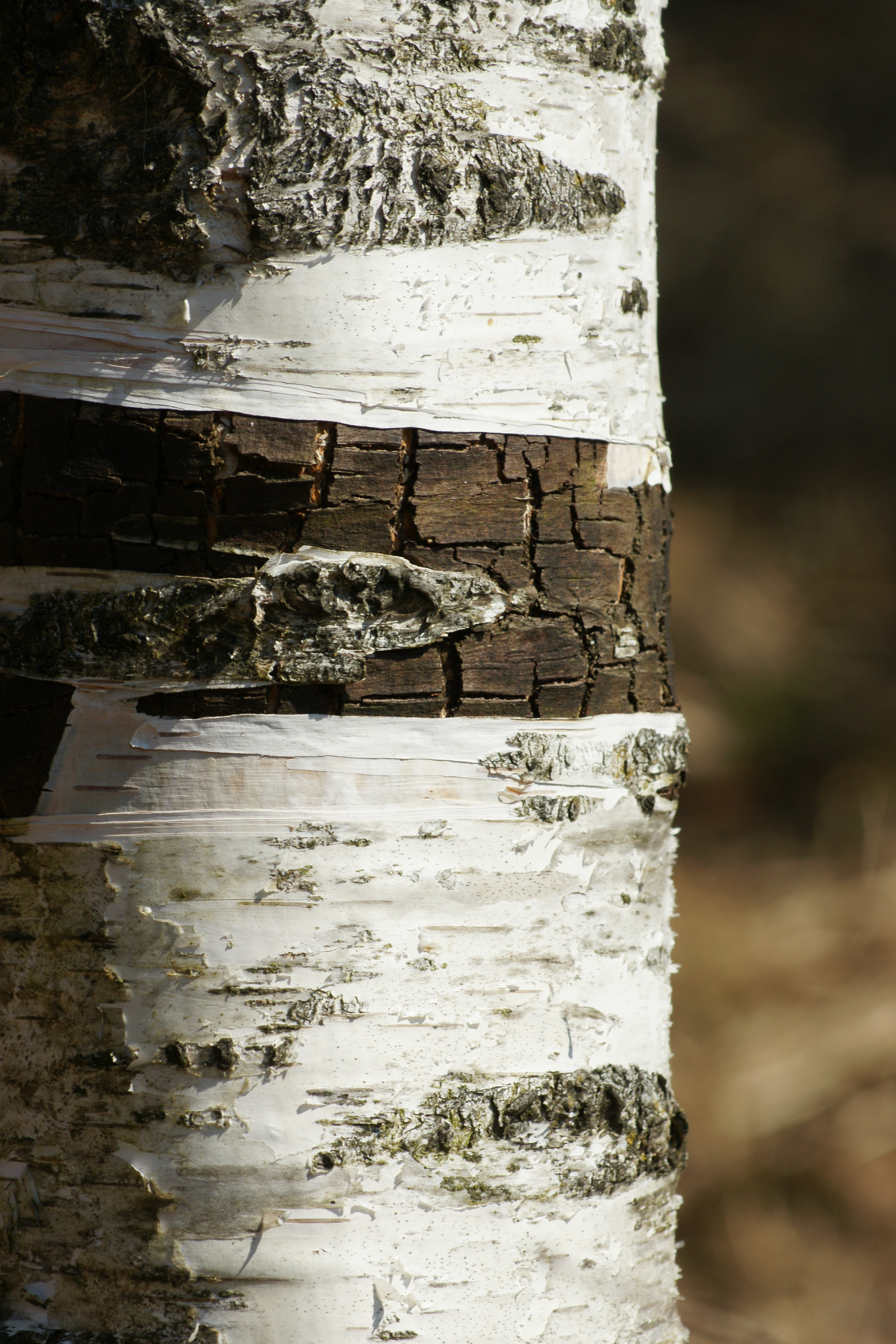 Birkenrinde Die Birken (lat. Betula, engl. Birch) bilden eine Gattung von Laubbäumen in der Familie der Birkengewächse (Betulaceae). Birken sind oft Pionierpflanzen auf freien Flächen. Birken werden bis zu 160 Jahre alt. Gesehen am alten Rhein in Hohenems.